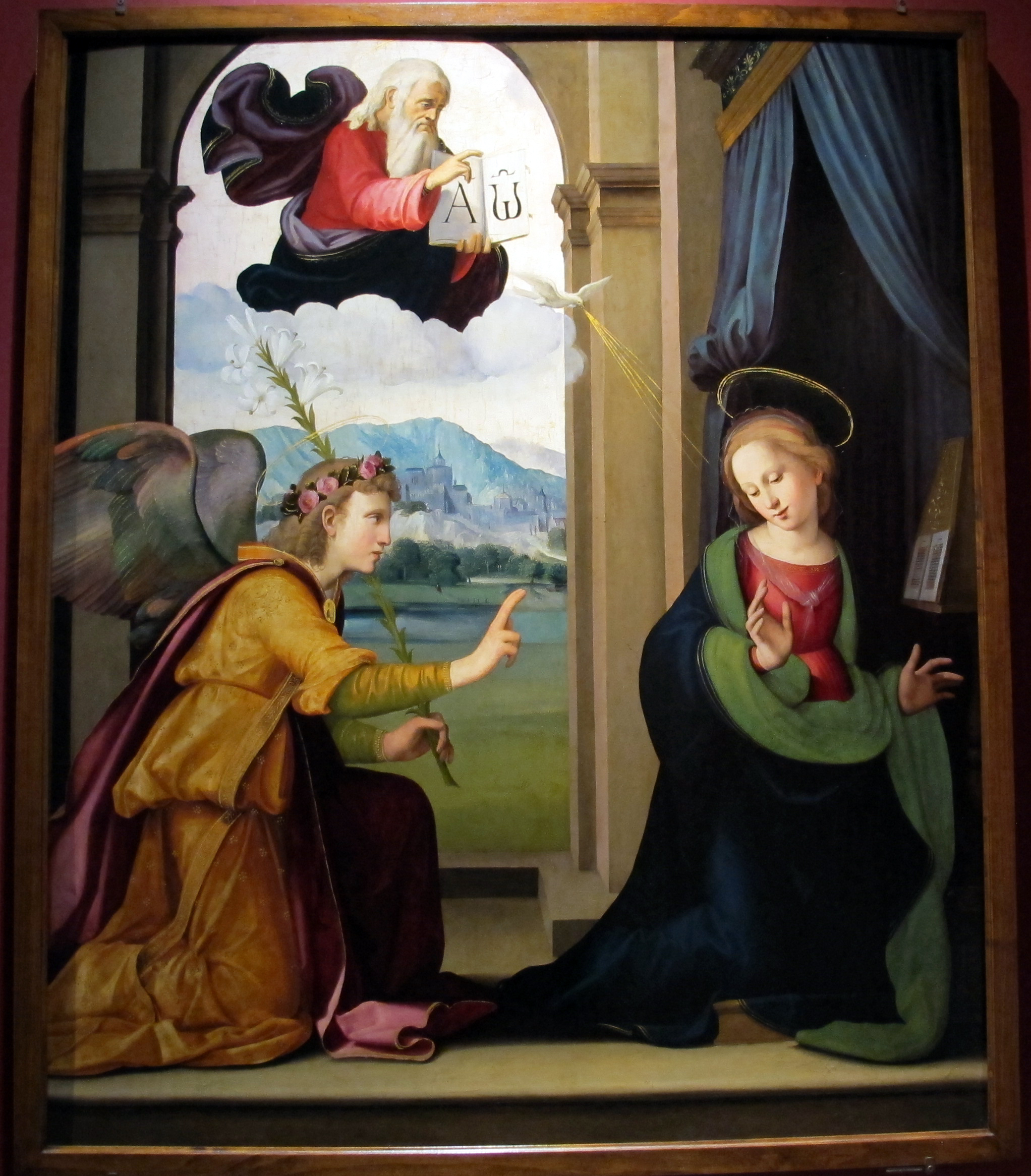 Figline Valdarno